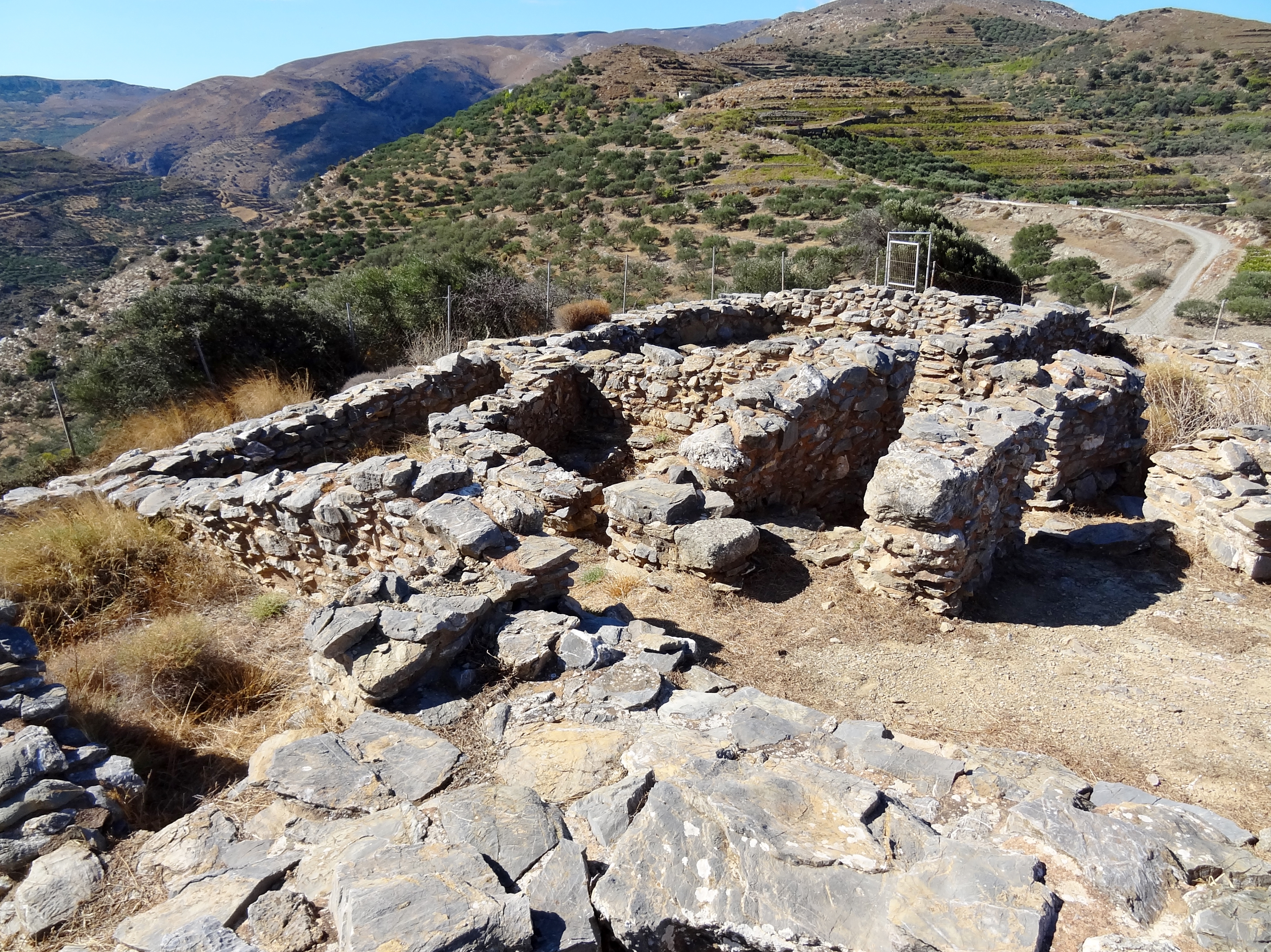 Ausgrabungsstätte des Minoischen Hauses von Chamaizi (Χαμαίζι), Gemeinde Sitia, Kreta, Griechenland